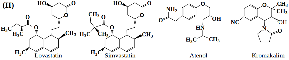 Լովաստատին, սիմվաստատին, ատենոլ, կրոմակալիմ